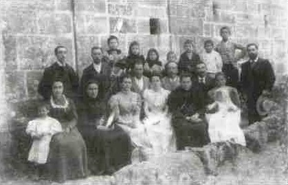 A familia de Antón Losada Diéguez (1884-1929)